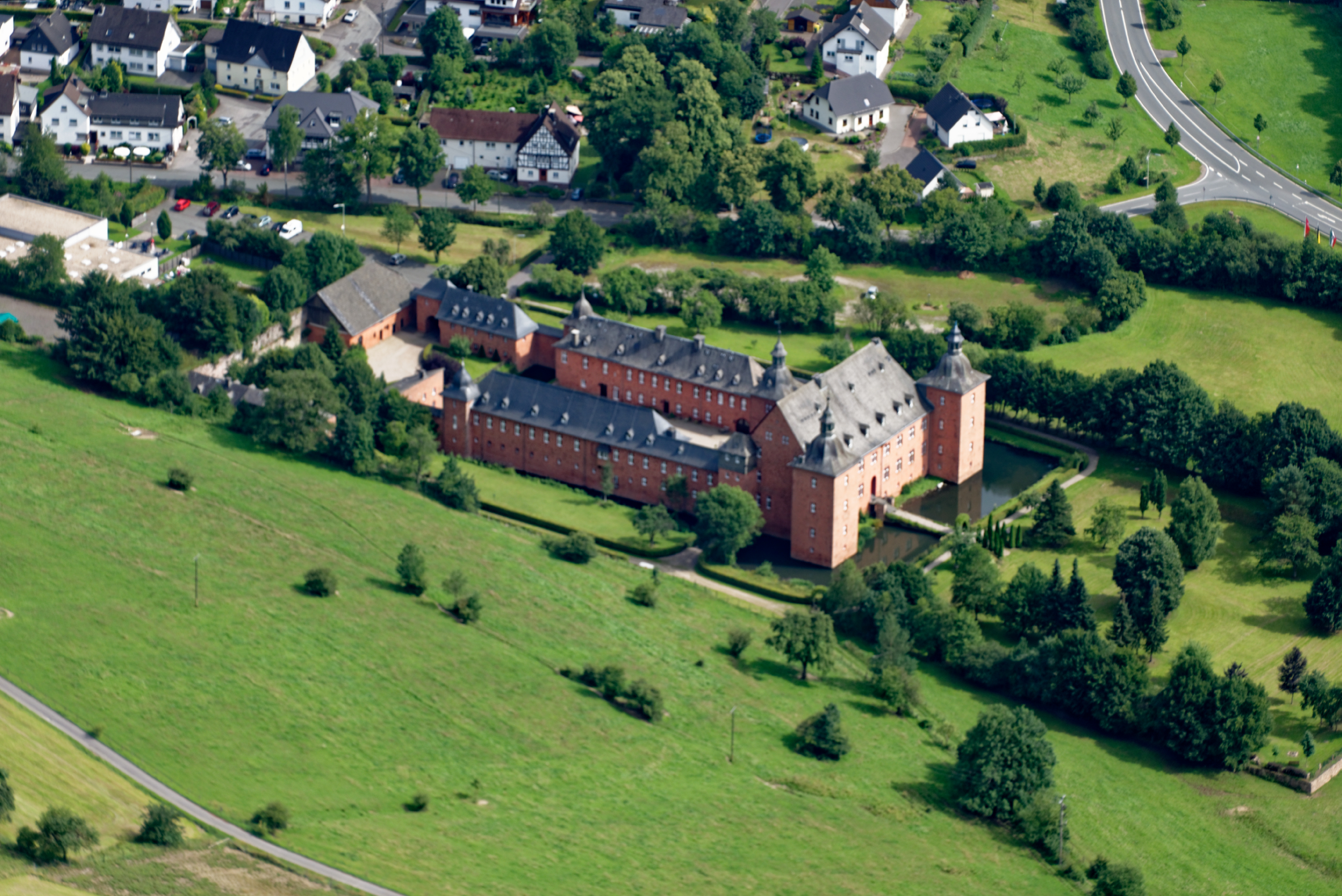 Luftaufnahme: Schloss Adolfsburg in Oberhundem (Kirchhundem), Nordrhein-Westfalen